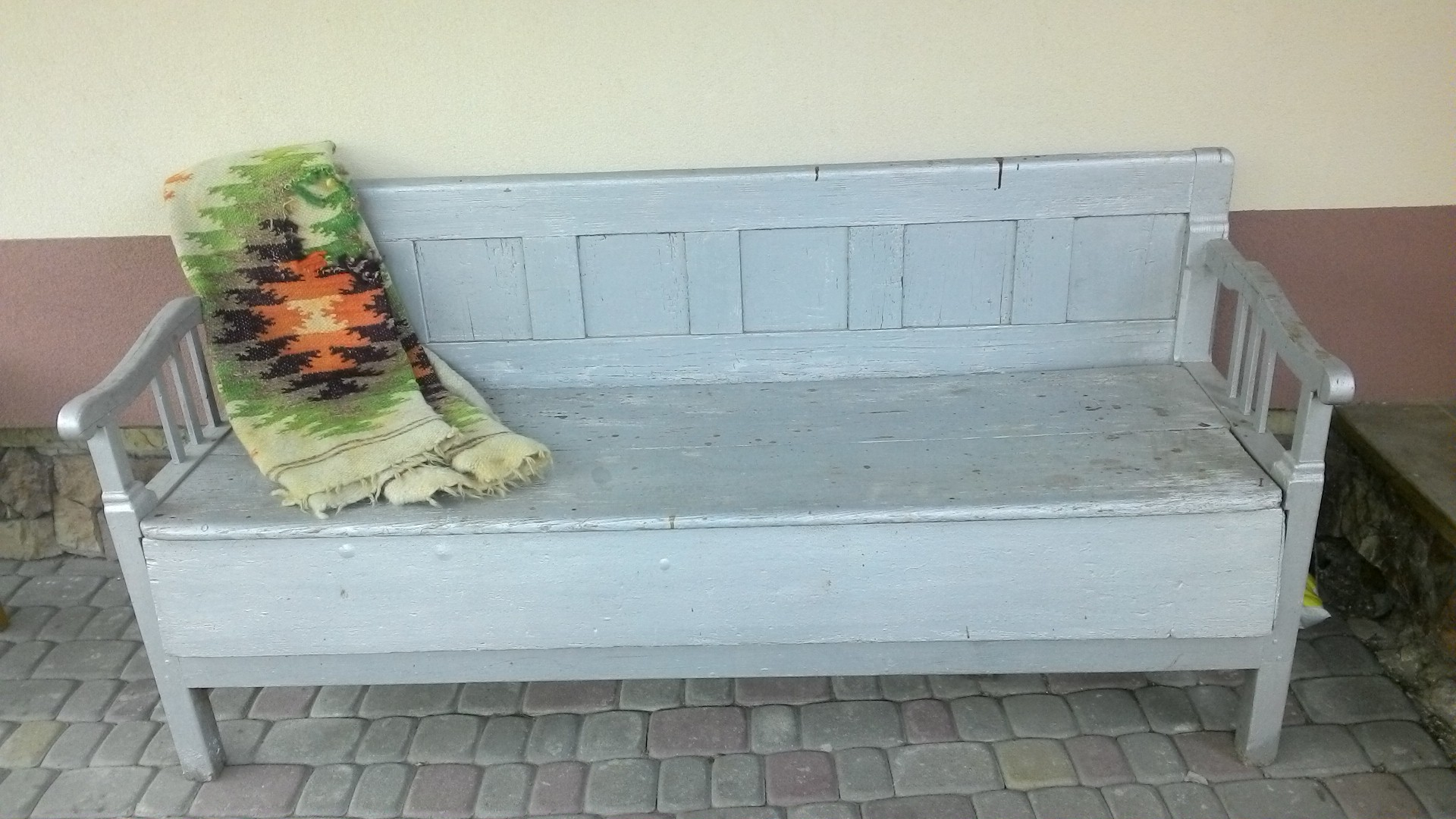 бамбетель